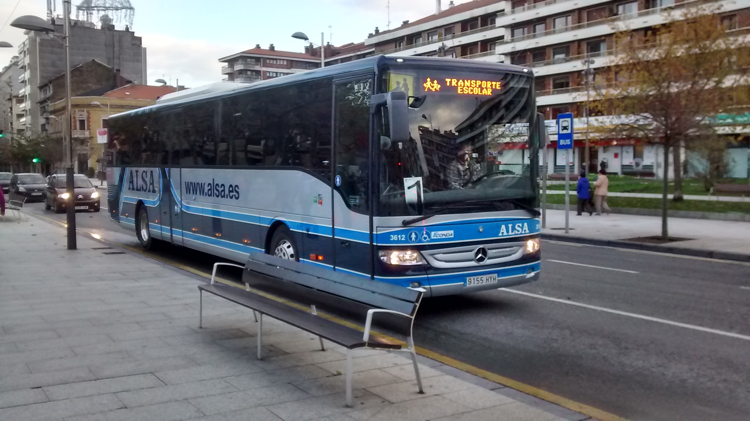 December 2014.